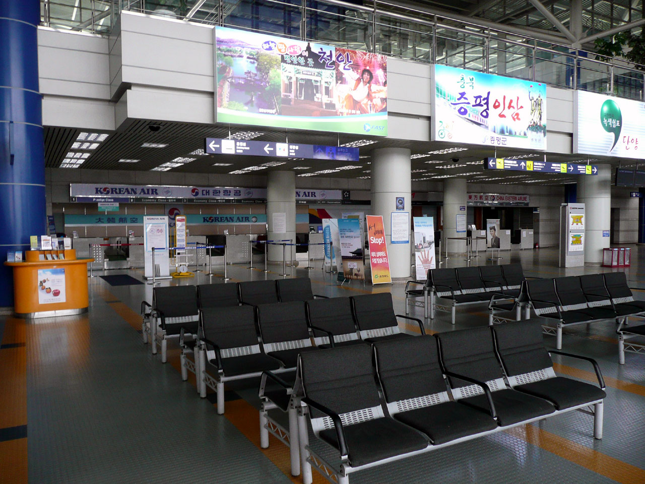 清州国際空港国際線チェックインカウンター